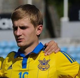 Денис Мірошніченко у фіналі Турніру пам'яті Валерія Лобановського 2015